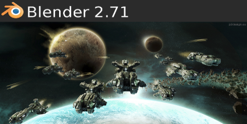 Blender 2.71 Splash Blender Foundation - Blender